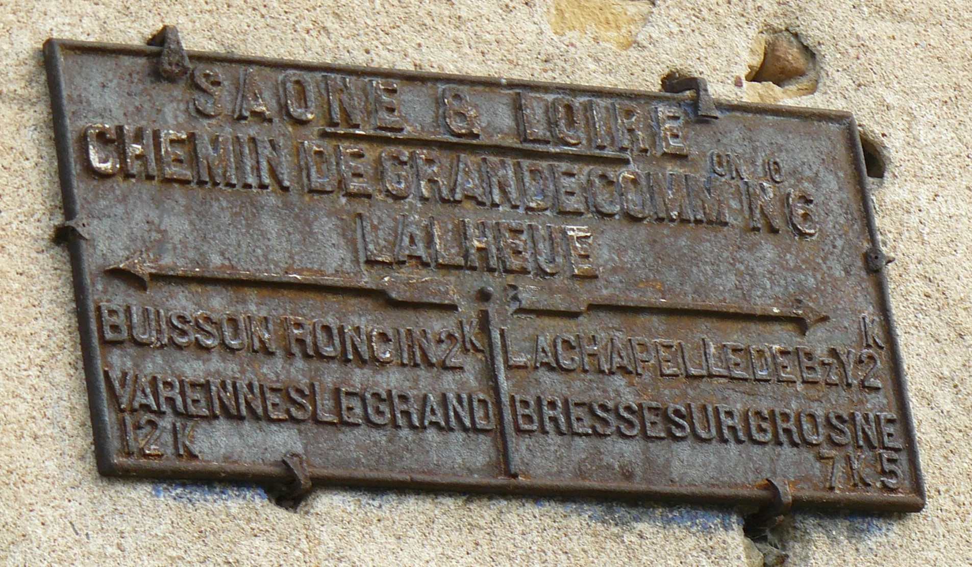 Plaque d'orientation routière du chemin de grande communication N° 6 à Lalheue (Saône-et-Loire)